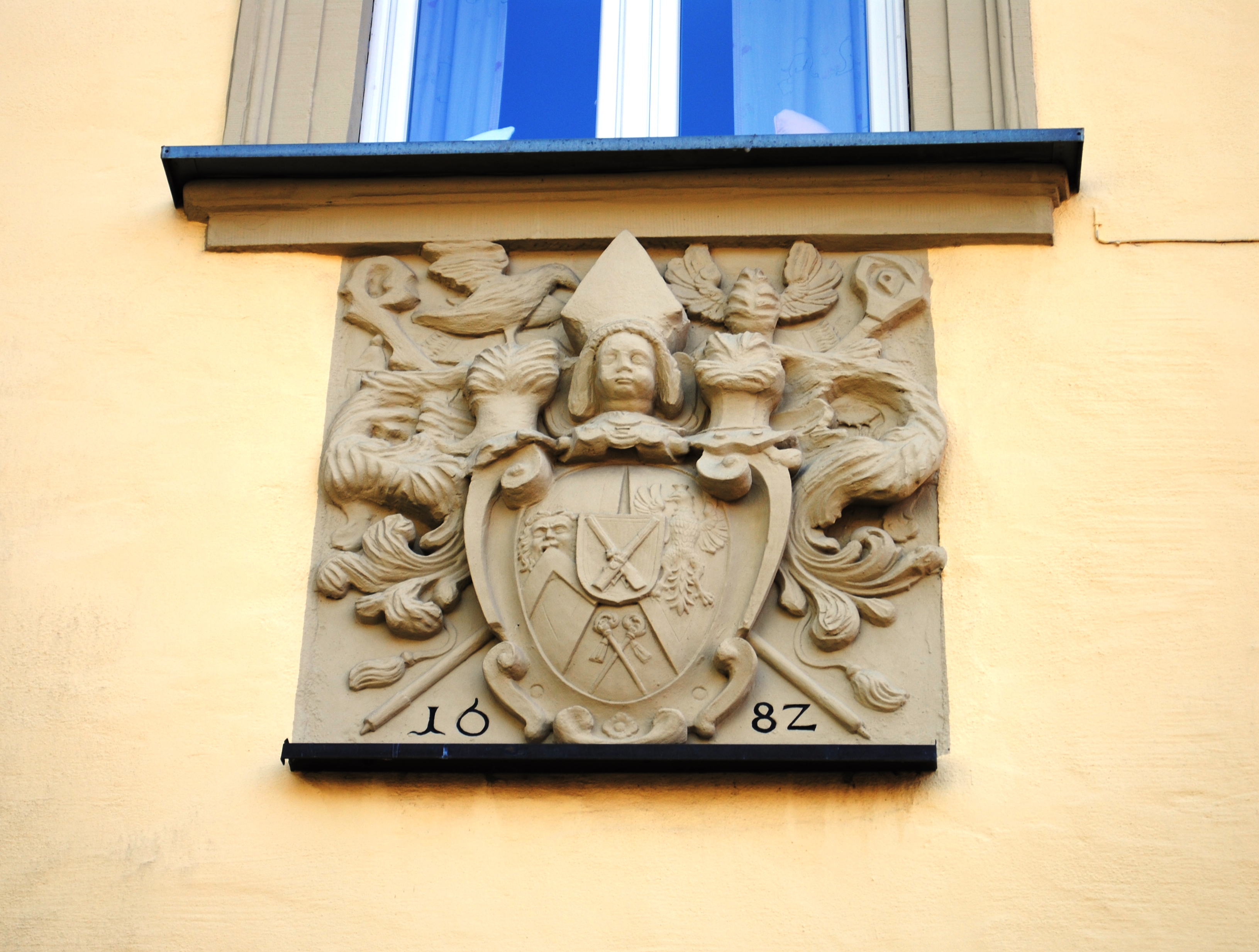 Wappen, Jahreszahl 1682, Zehnthof Sommerach, HauptstraßeThis is a photograph of an architectural monument.